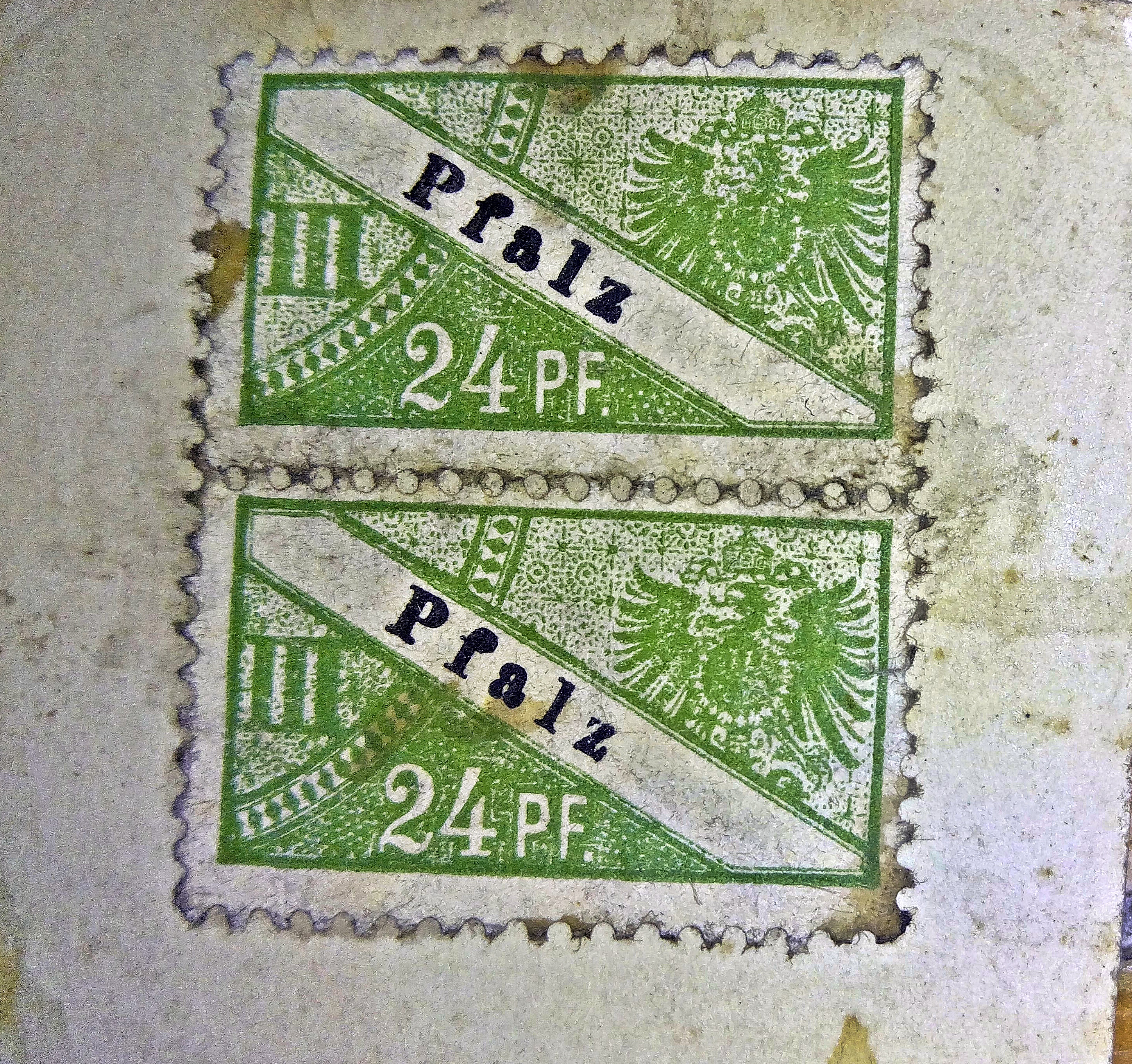 Beitragsmarke der LVA Pfalz (Beitragsklasse III, verwendbar in der Zeit vom 01.01.1891-31.12.1899) für die Invalidenversicherung